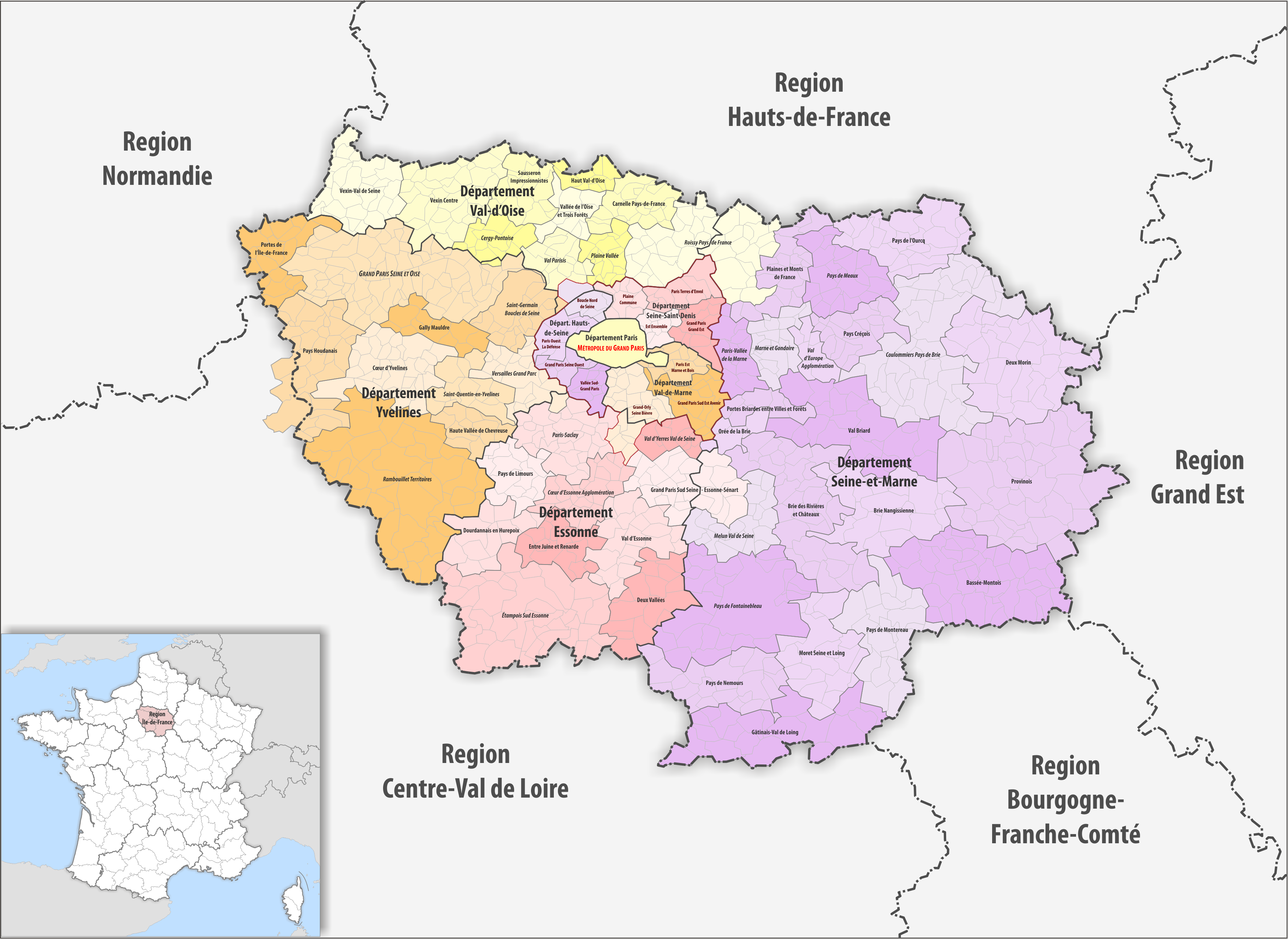 Gemeinden, Gemeindeverbände und Départemente in der Region Île-de-France